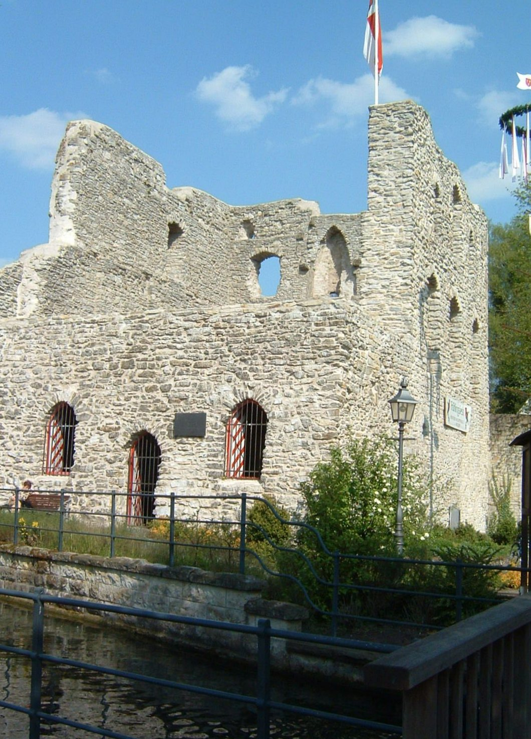 Die Burg mit der Lippe im Vordergrund, die am Fuß der Burg entspringt; Bad Lippspringe